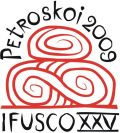 International Finno-Ugrist Students’ Conference 2009 Logo